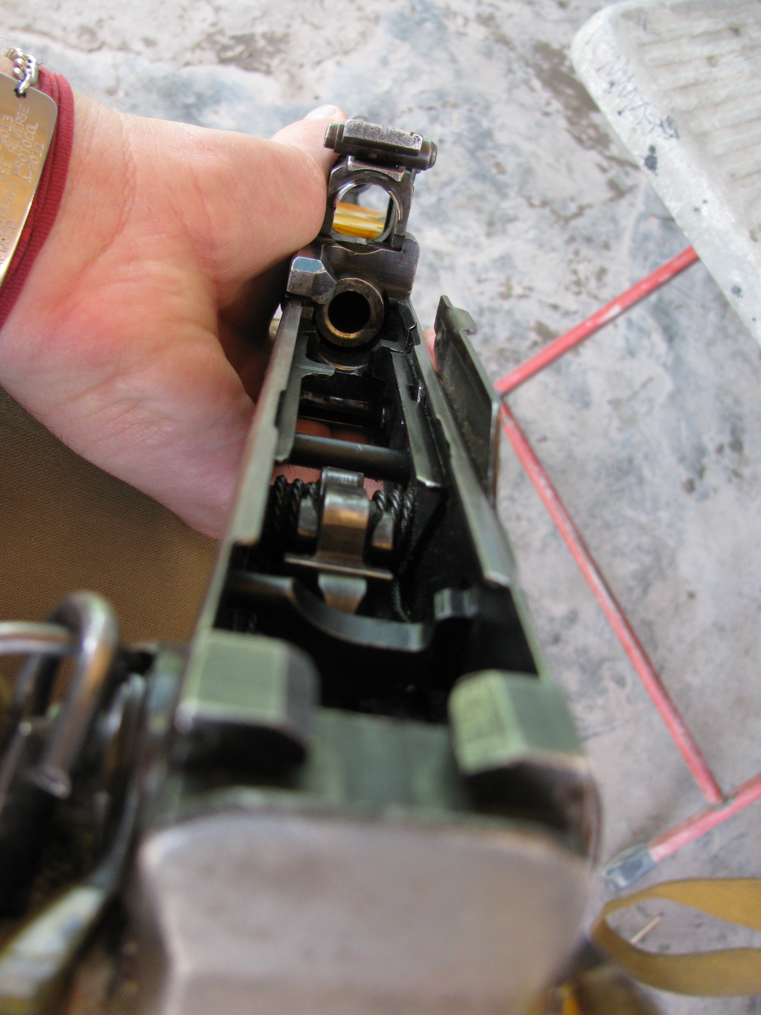 Cleaning an AK.